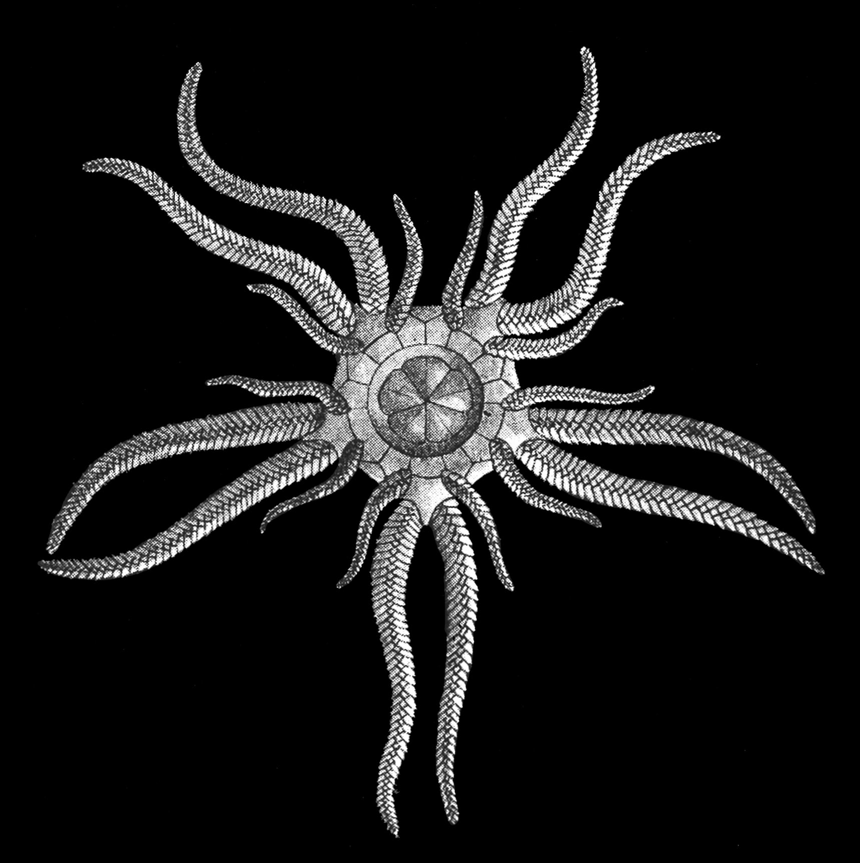 Drawing of an Ophiocystioidea from Sollas, 1889.